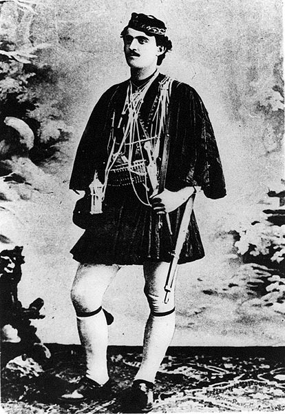 Стефос Григориу